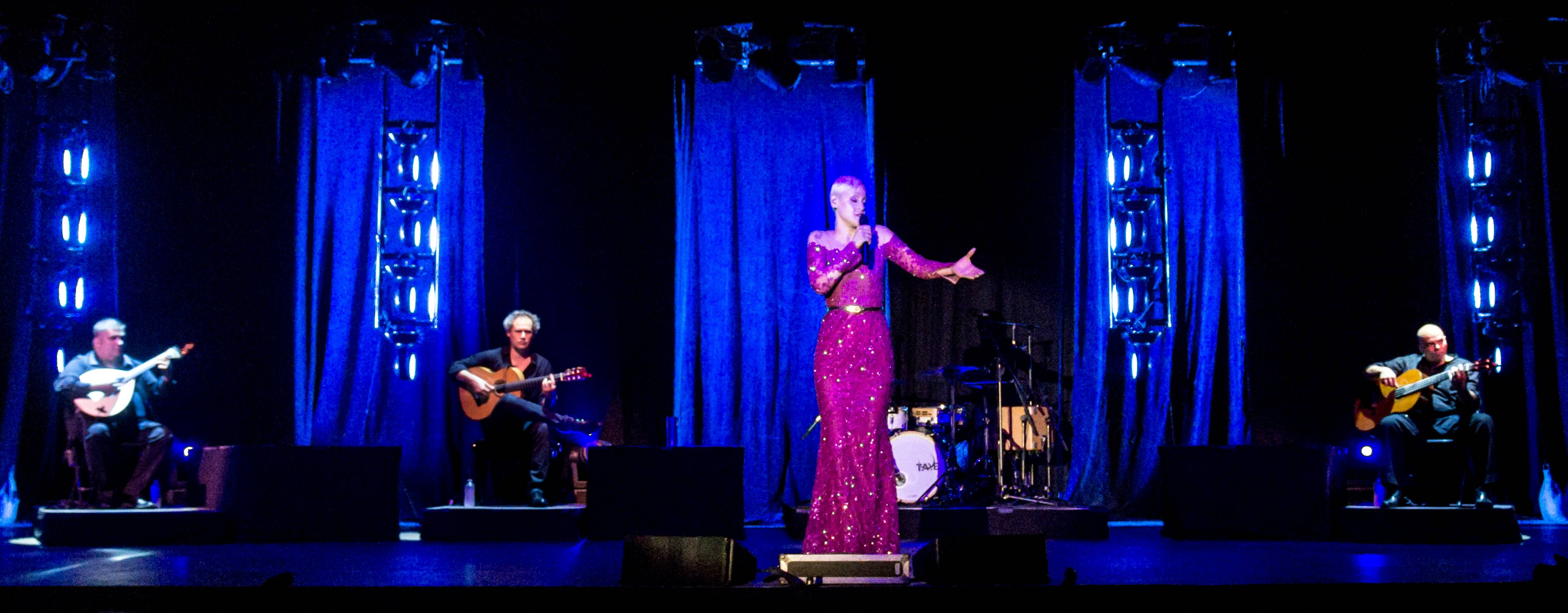 Bilder vom ZMF 2015 Mariza